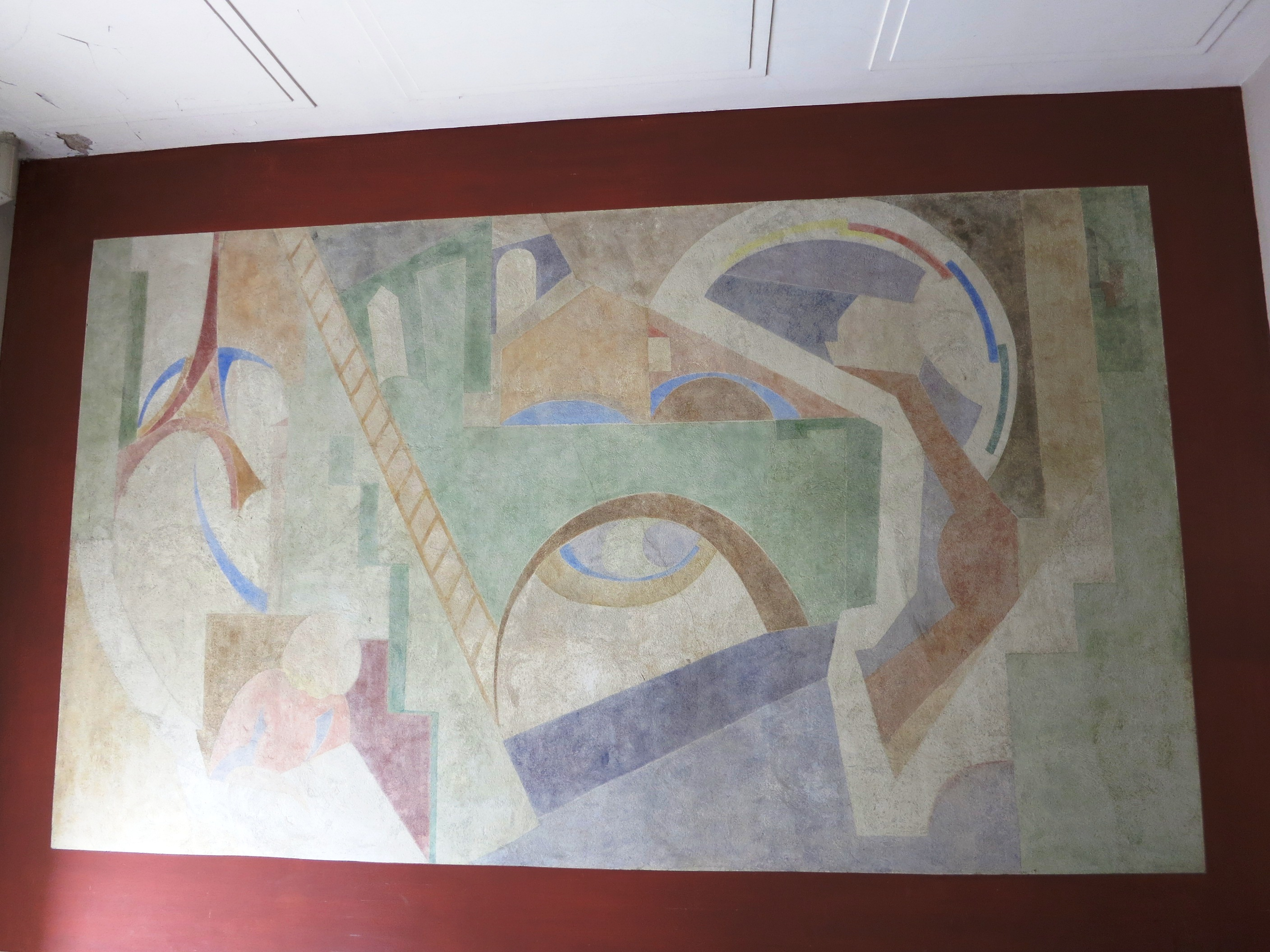 Wandmalerei von Otto van Rees 1916, Zürich-Hottingen, Schweiz